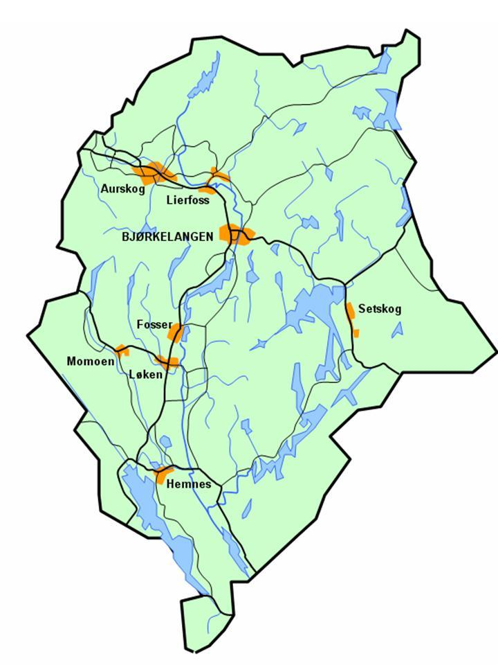 Stilisert kart over Aurskog-Høland kommune. Ikke kartografisk korrekt framstilt.